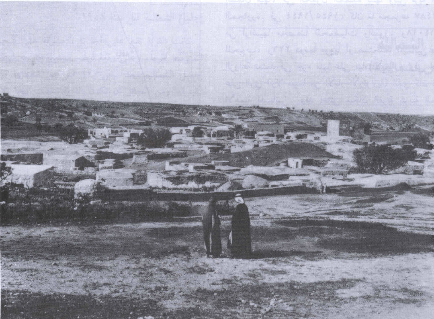 Beit Dajan, Palestine, before 1935